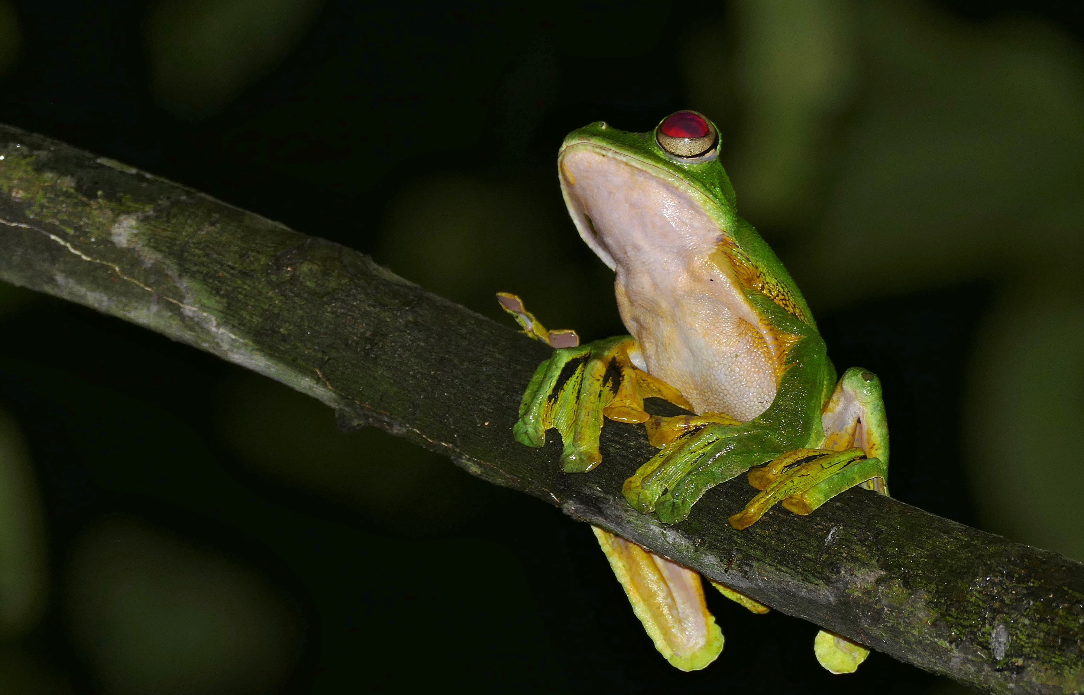 Mulu NP, Sarawak, MALAYSIA